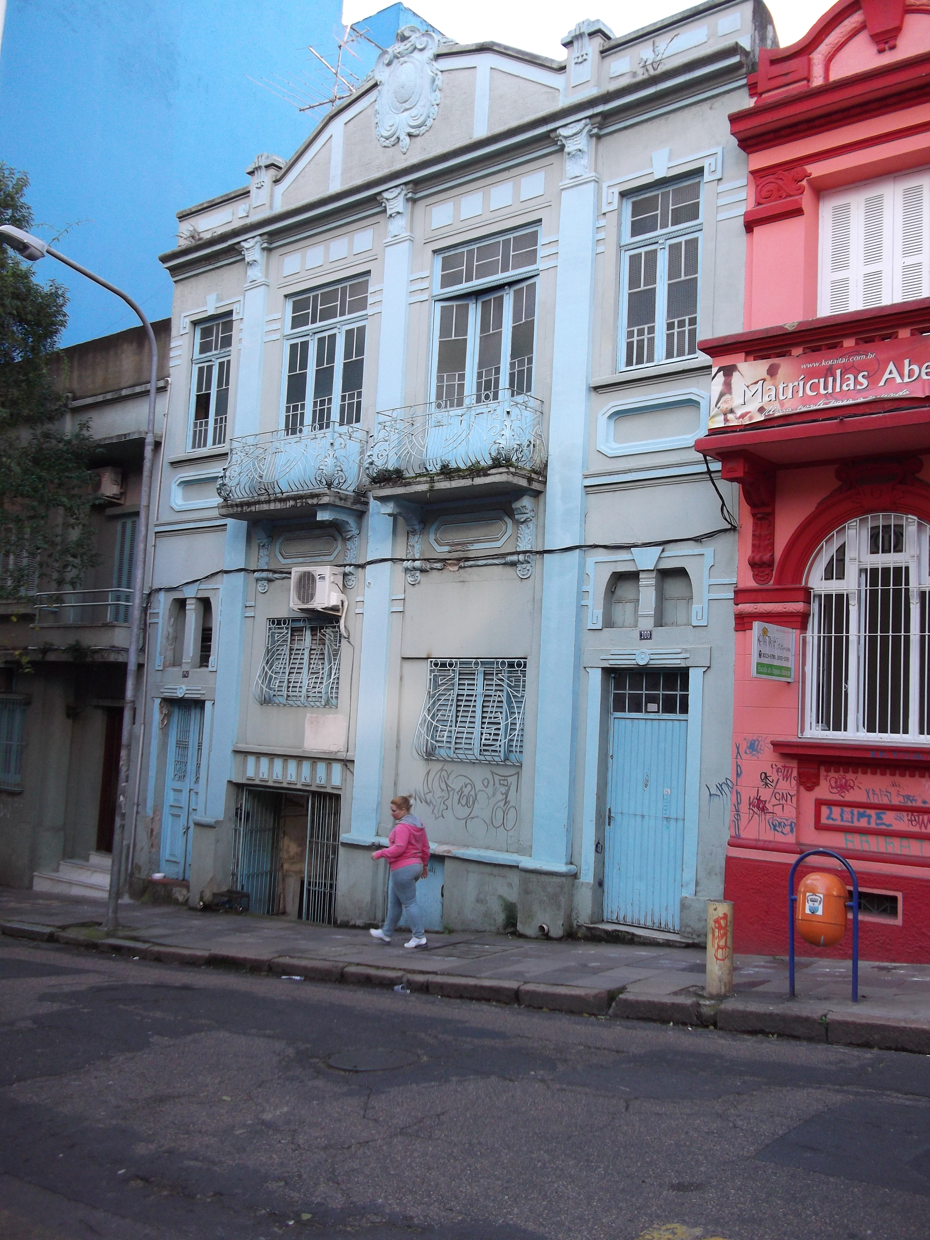 Rua João Manoel n. 300